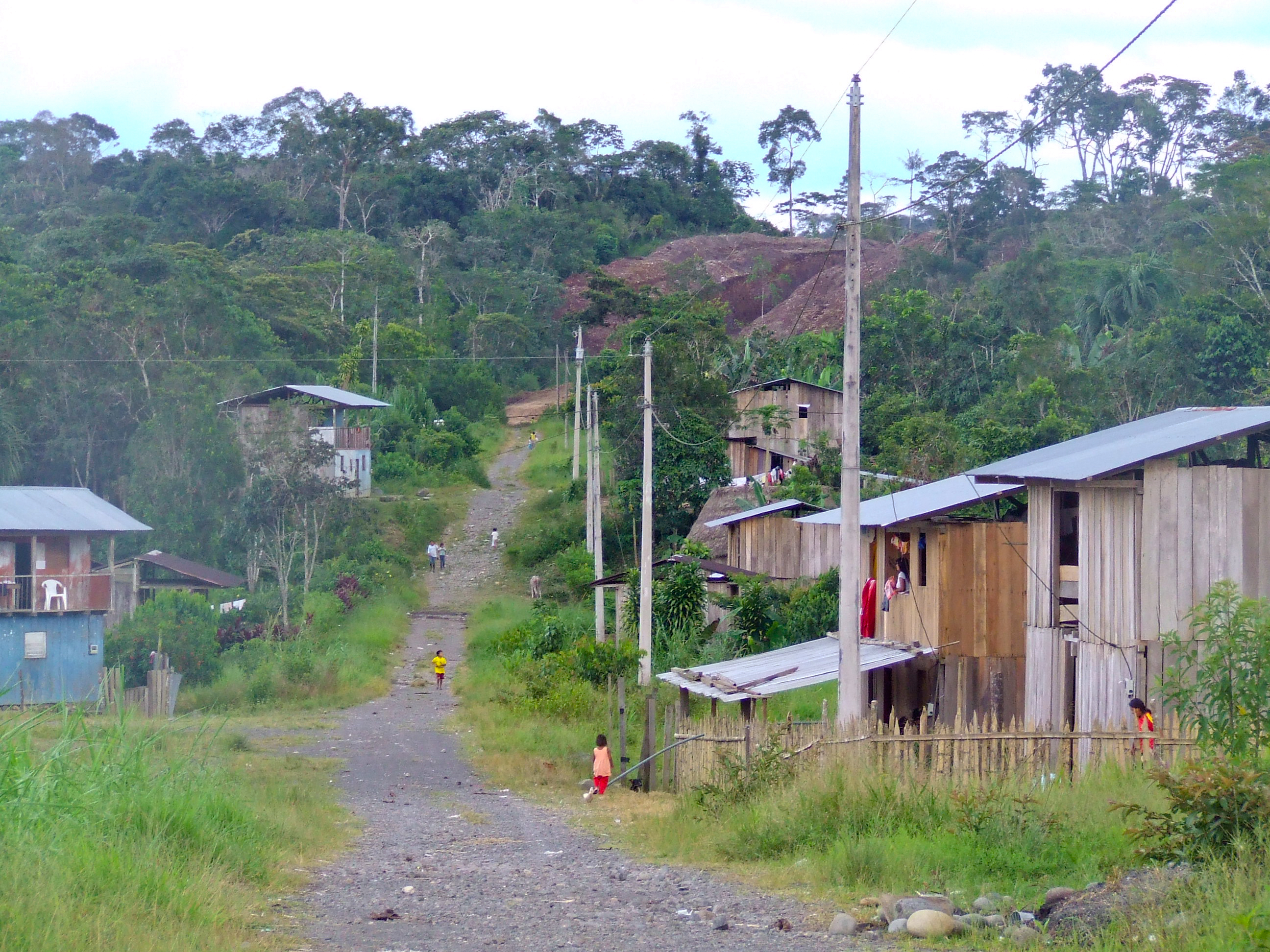 Shuar Dorf einer Communidad am Andenostabhang der ecuadorianischen Provinz Morona Santiago